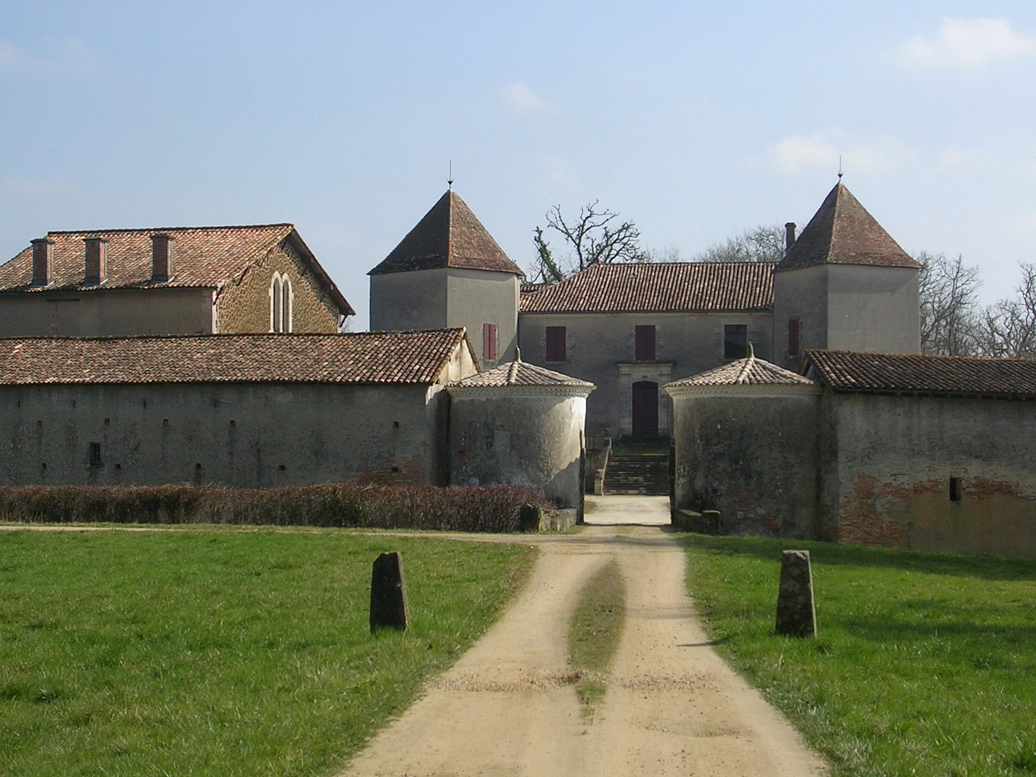 Château de Rochefort-Lavie à belhade, dans le département français des Landes